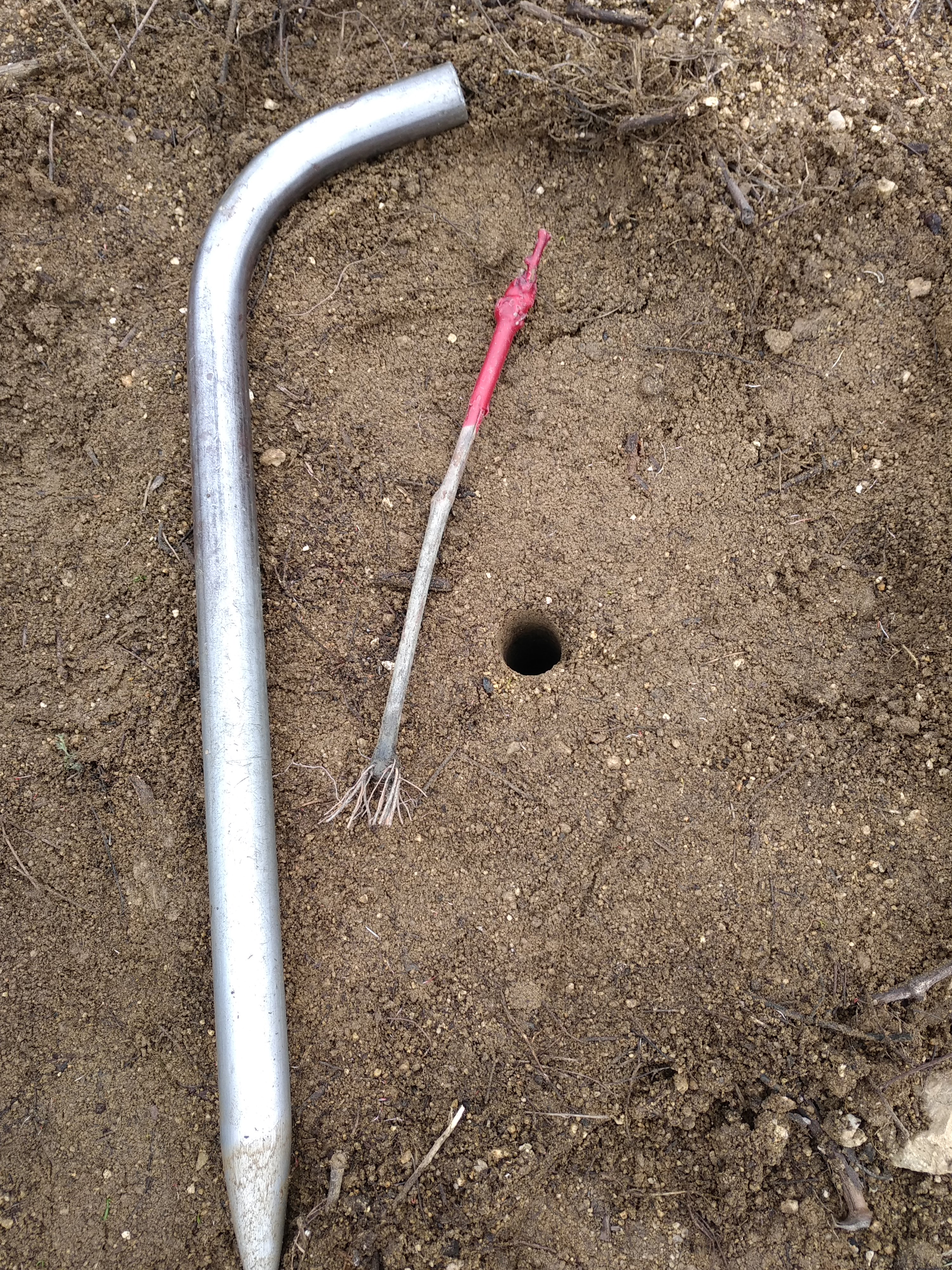 Plantoir utilisé pour faire le trou pour un plant de vigne.